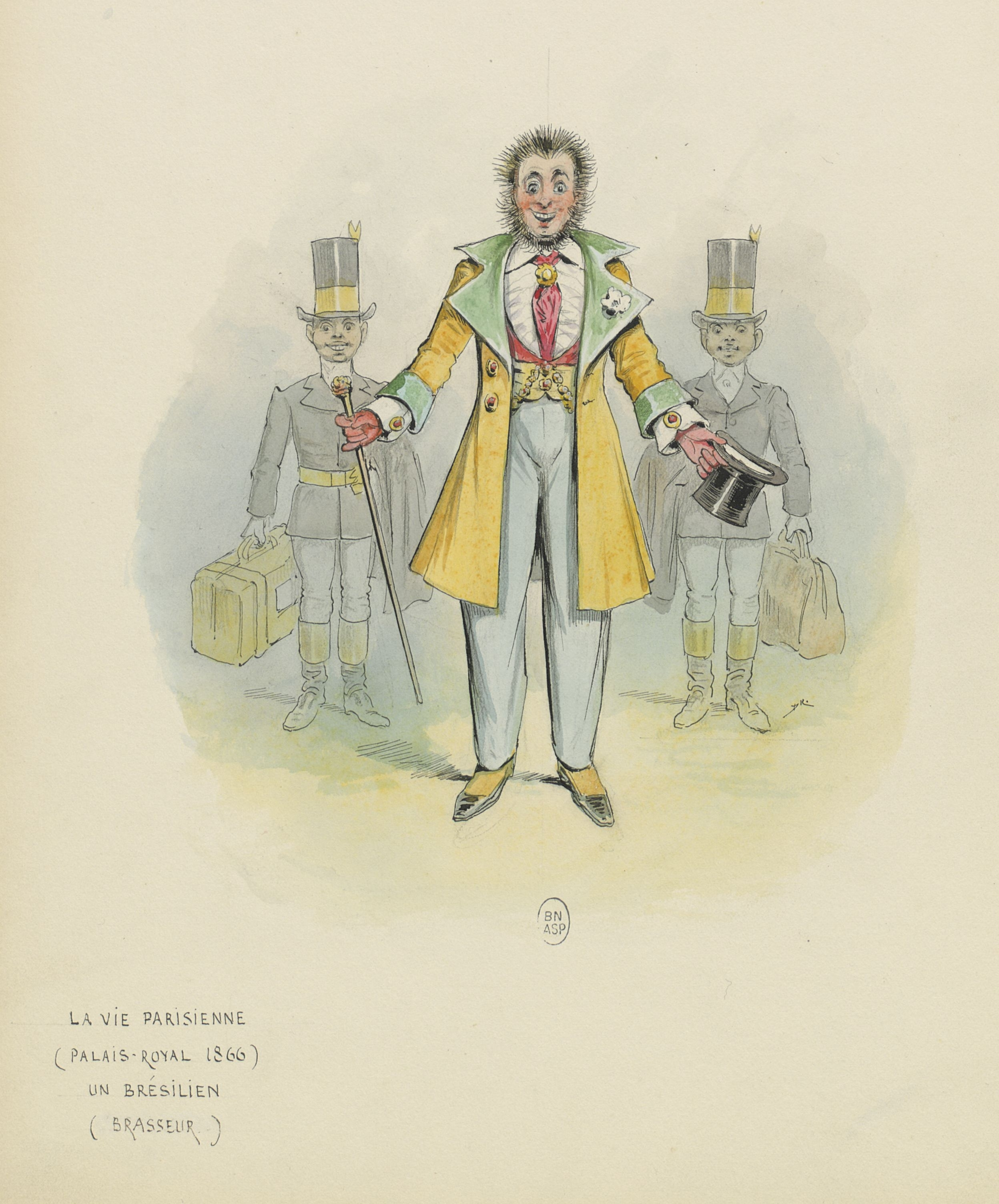 La vie parisienne, opéra-bouffe de Meilhac, Halévy et Offenbach : portraits des acteurs en costumes par Draner